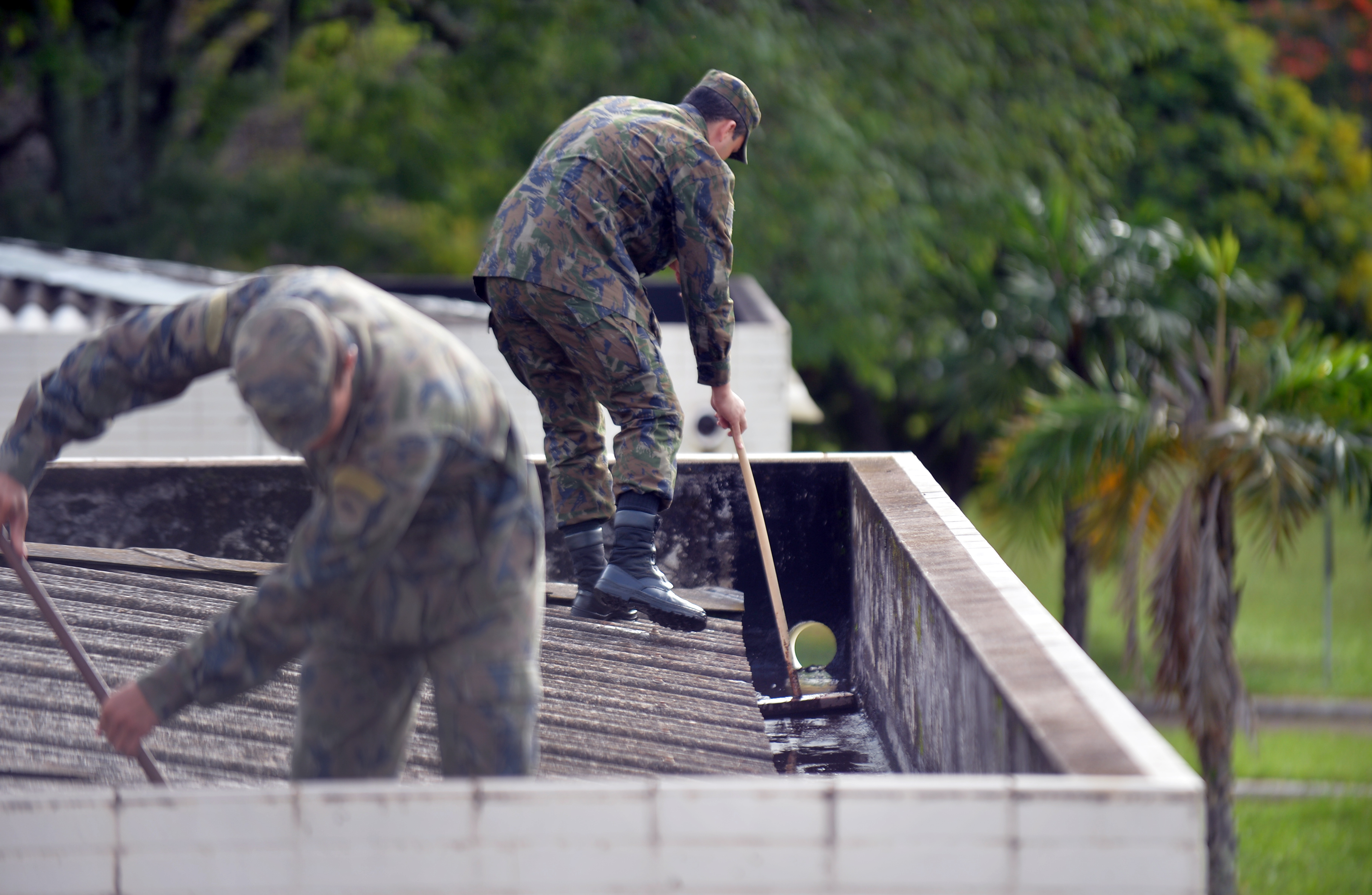 29/01/2016, Brasília - DF Fotos: Tereza Sobreira